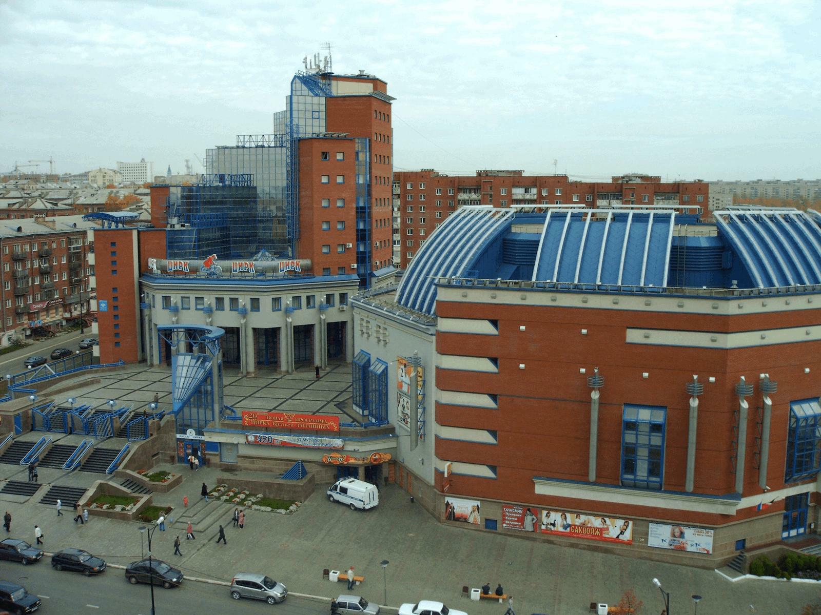 Государственный Цирк Удмуртии, г. Ижевск